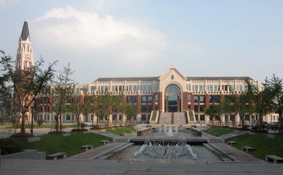 華東政法大學 松江校區 圖書館與鐘塔